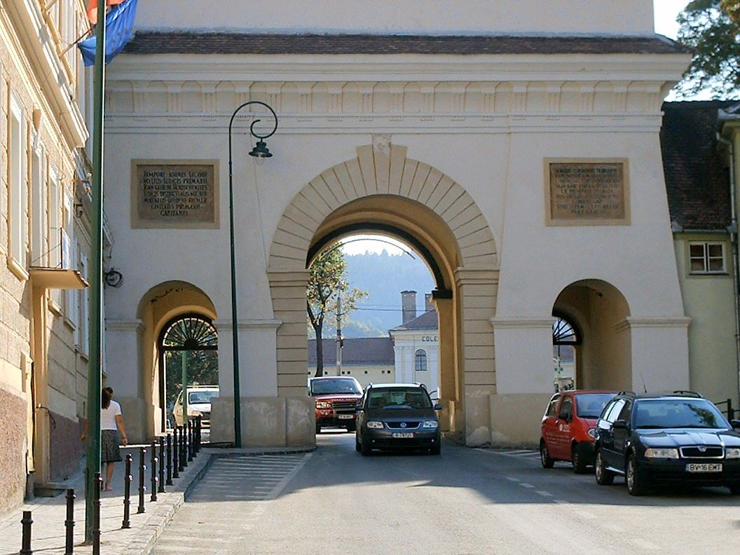 Şchei gate from Braşov